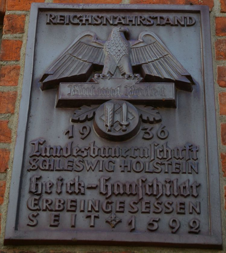 Vom Reichsnährstand 1936 gekennzeichneter Erbhof.